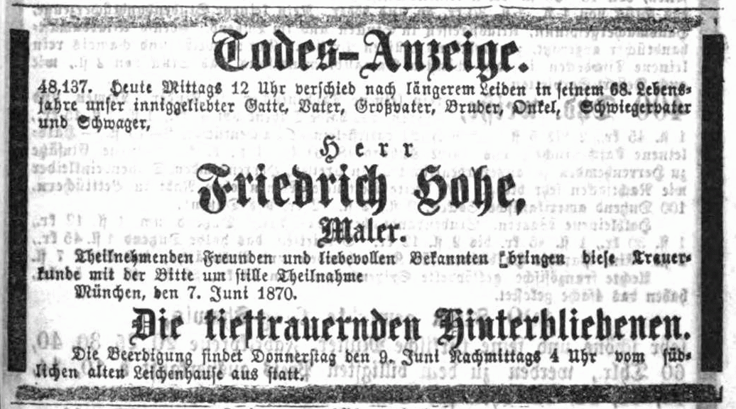 „Todes-Anzeige ... Friedrich Hohe“ (1802-1870), German painter and lithographer